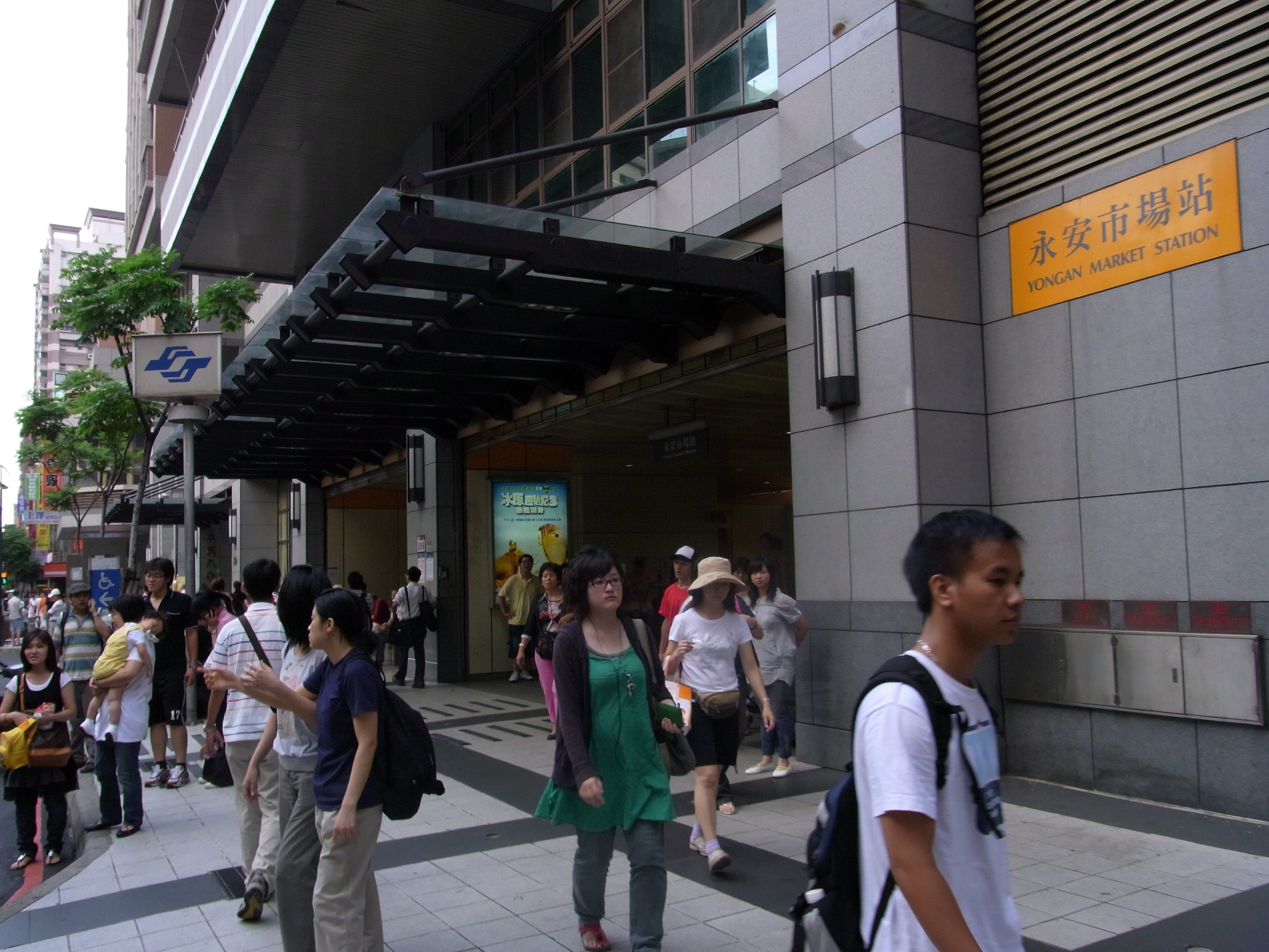 永安市場站出口